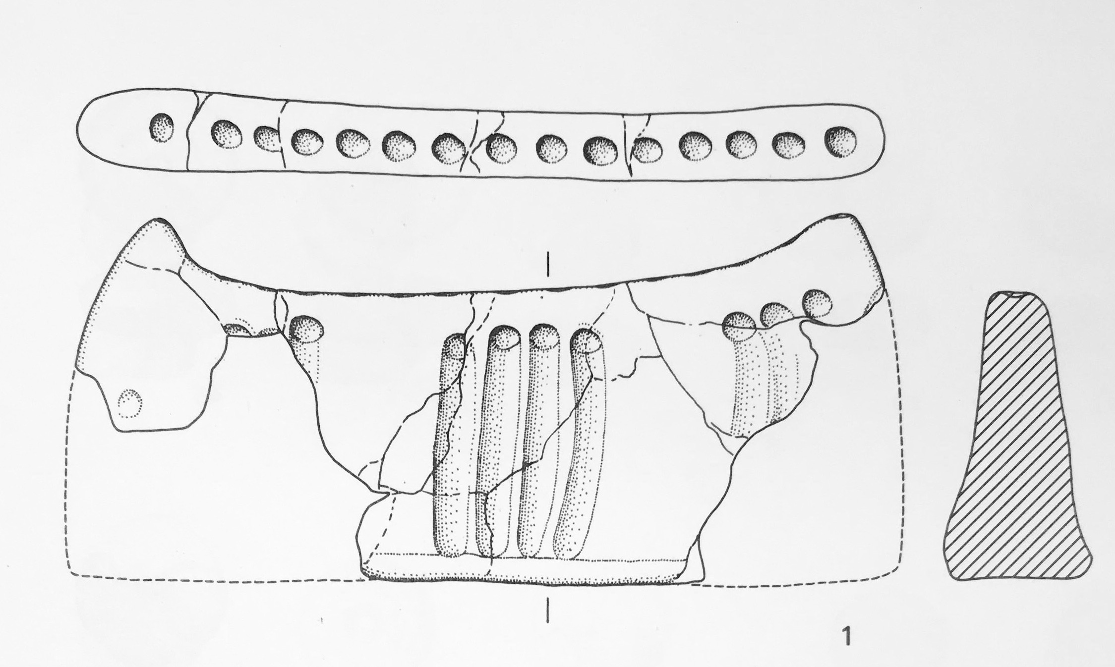 Croissant d'argile découvert à Cortaillod-Est. Tiré de ARNOLD B. 1986 : Cortaillod-Est, un village du Bronze final 1, fouille subaquatique et photographie aérienne Ed. du Ruau, Saint-Blaise. p. 156